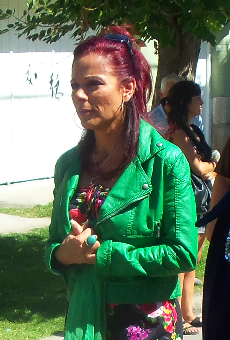 Iliana Calabró en la procesión de los pescadores del Puerto de Mar del Plata junto a las Reina y Princesa de los Pescadores, Iliana fue la madrina de la Fiesta de los Pescadores